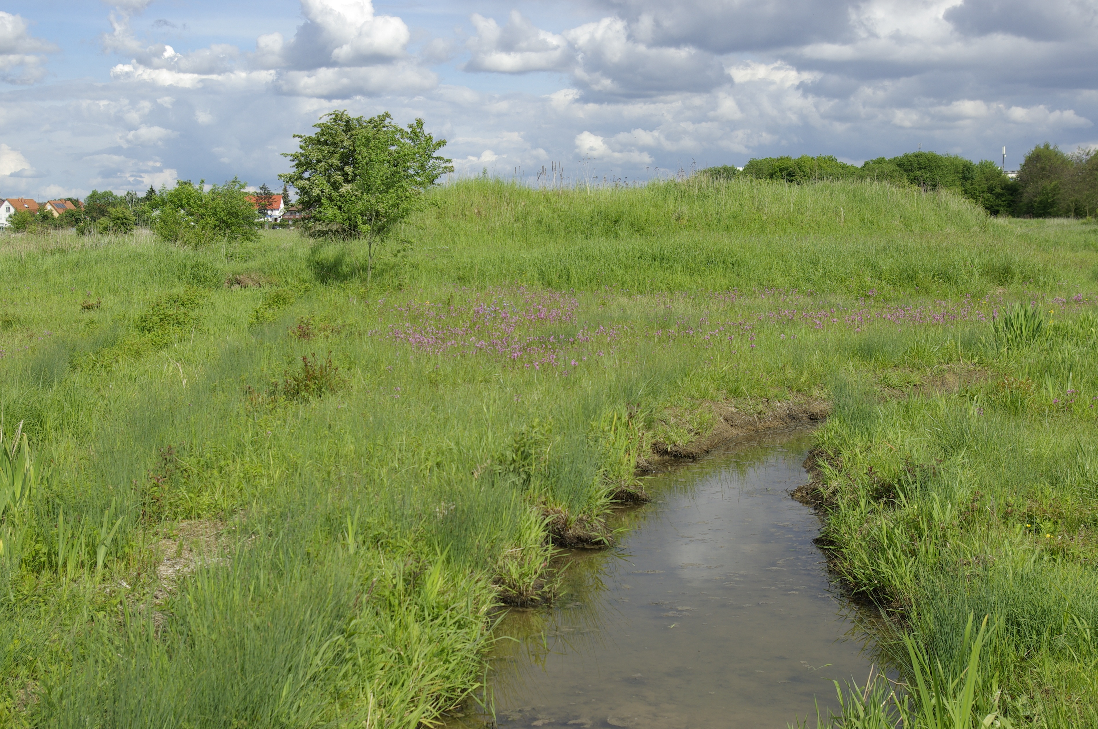 Der in diesem Abschnitt renaturierte Herboldshofer Landgraben östlich der A 73, Teil des Landschaftsschutzgebietes Herboldshofer Landgraben in Fürth.